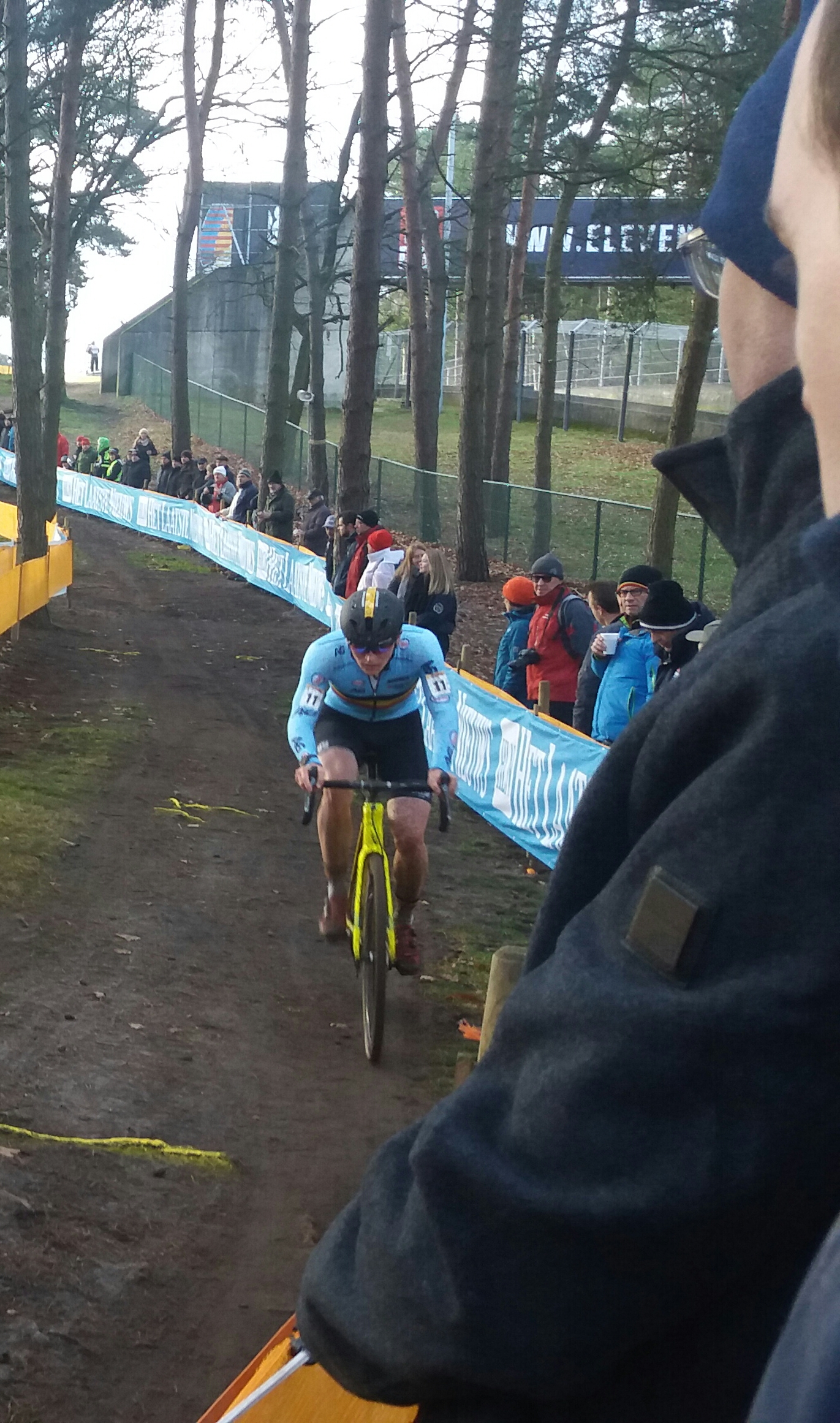 Thijs Aerts